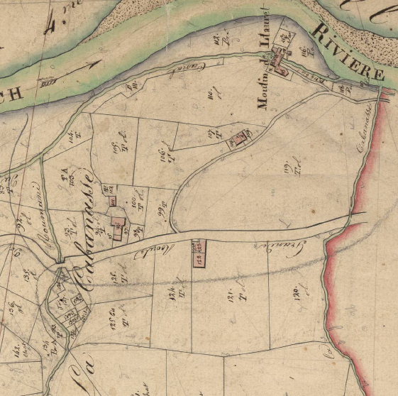 La Cabanassa de Reiners en el Cadastre napoleònic del 1812 (Arxius Departamentals dels Pirineus Orientals)